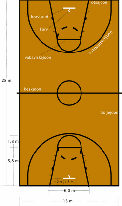 Korvpalliväljaku mõõtmed